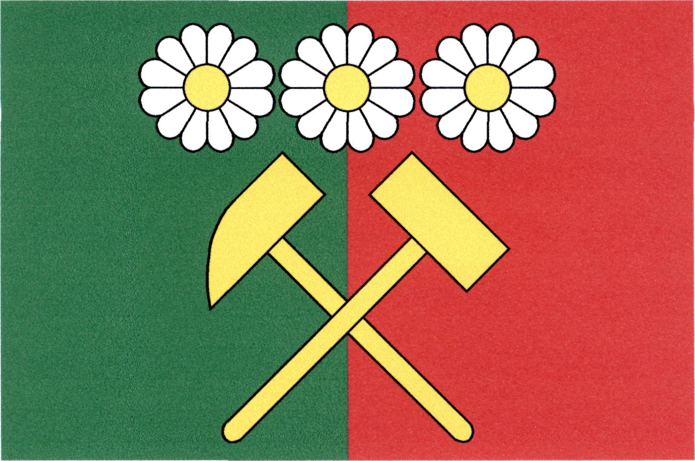 Vlajka obce Dolní Rychnov